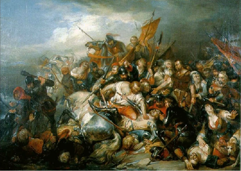 pavane la battaglia